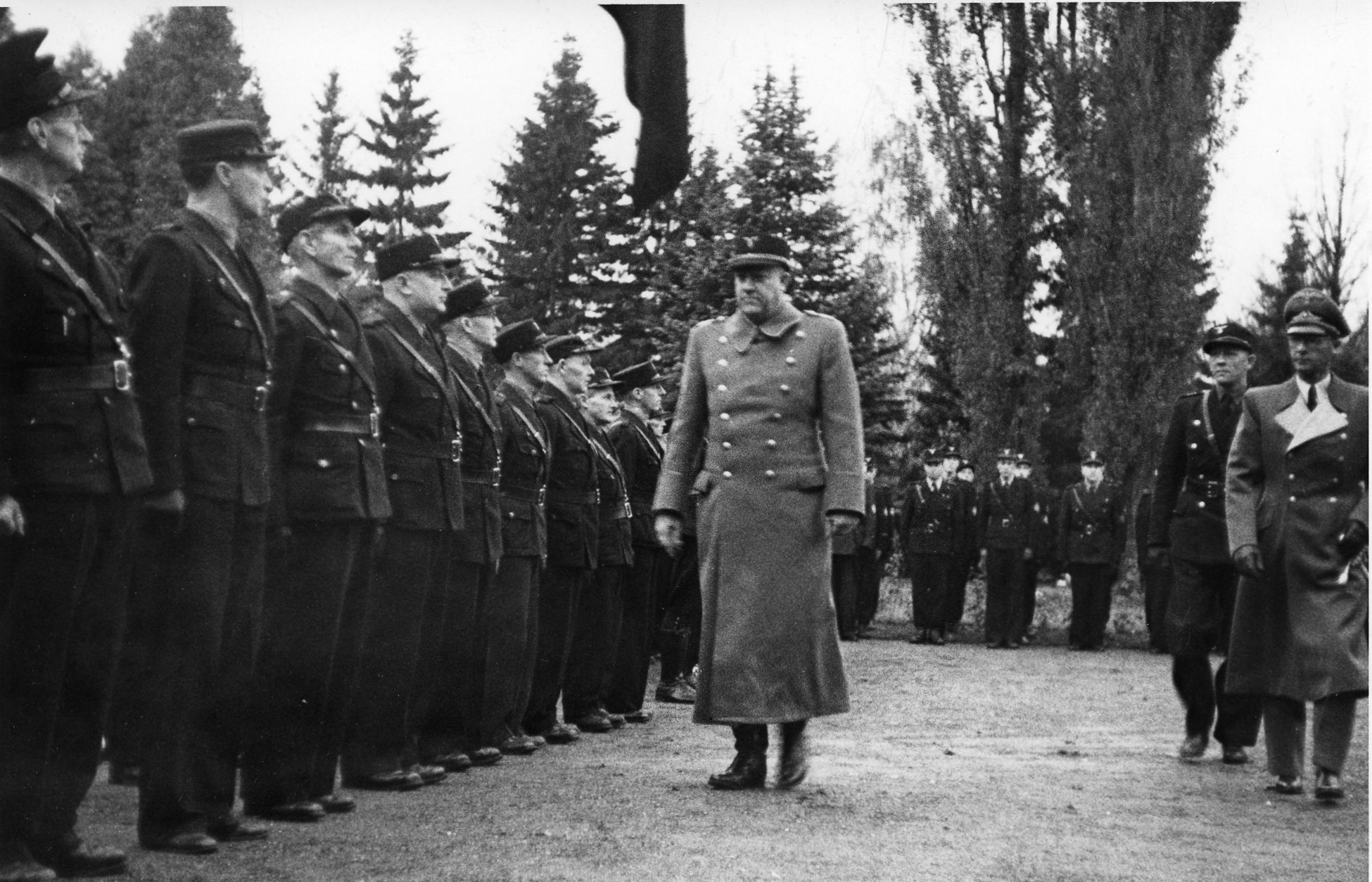 1942/09/24. RA/RAFA-3309/U 41B/13 /41-13-1 img354